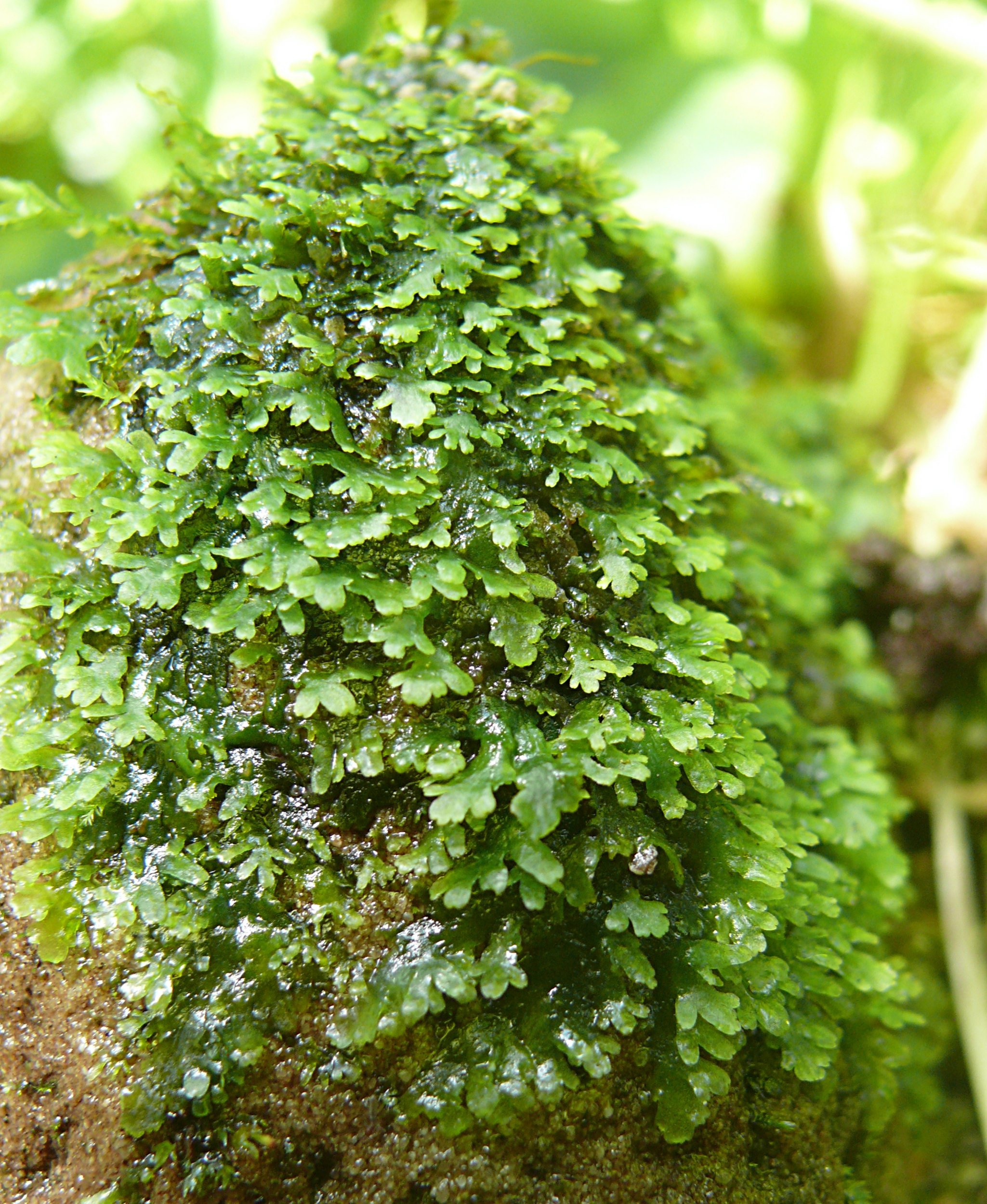 Riccardia chamaedryfolia, Nordschwarzwald